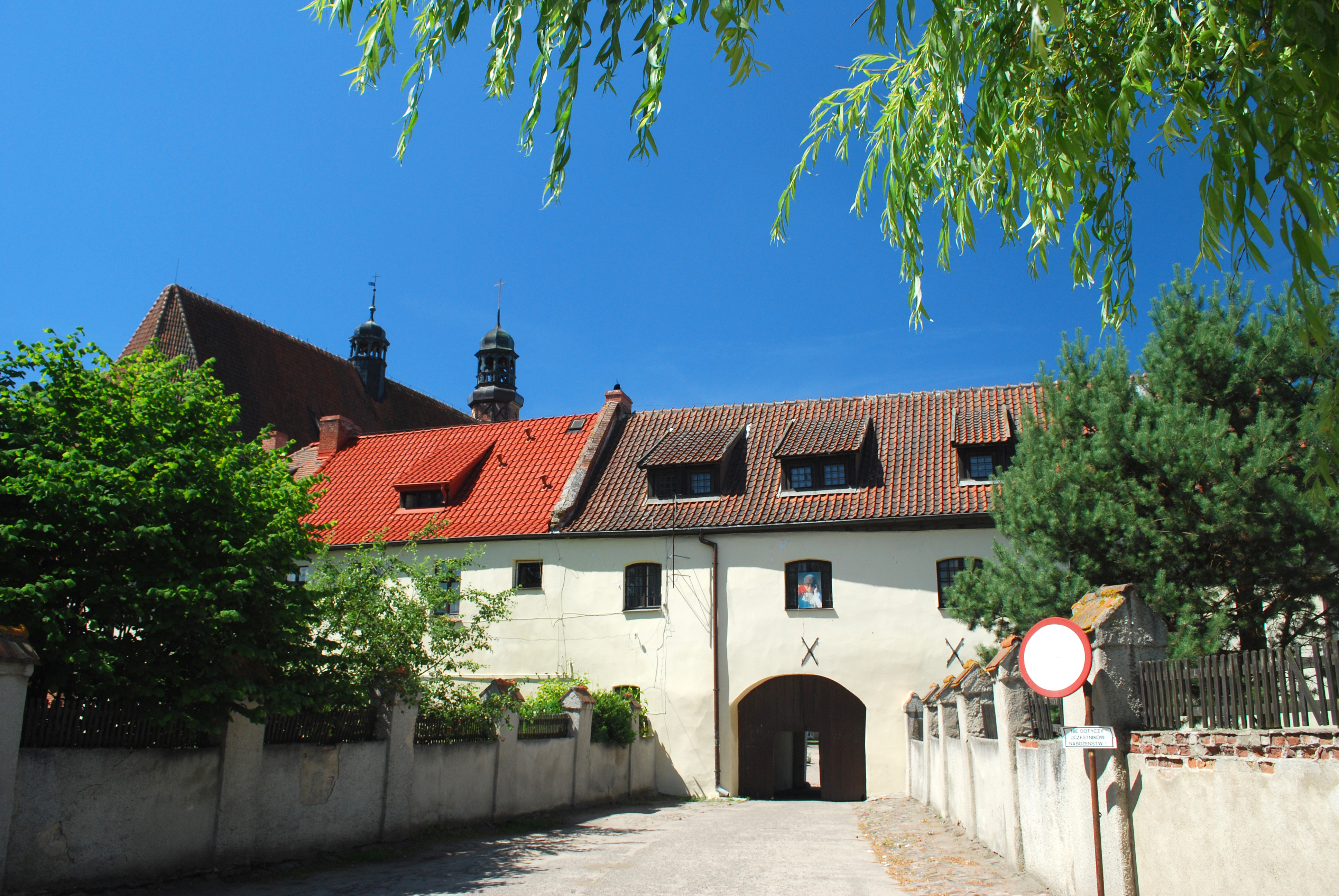 Wejście do klasztoru norbertanek w Żukowie